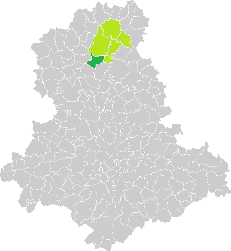 Carte de situation de la commune de Droux (en vert foncé) dans le votre Canton (en vert clair) sur une carte des communes de la Haute-Vienne